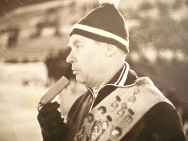 Г.Пискунов открывает соревнования ветеранов, г.Горький, 1985 год